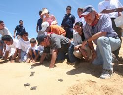 Tortuguitas en el campamento